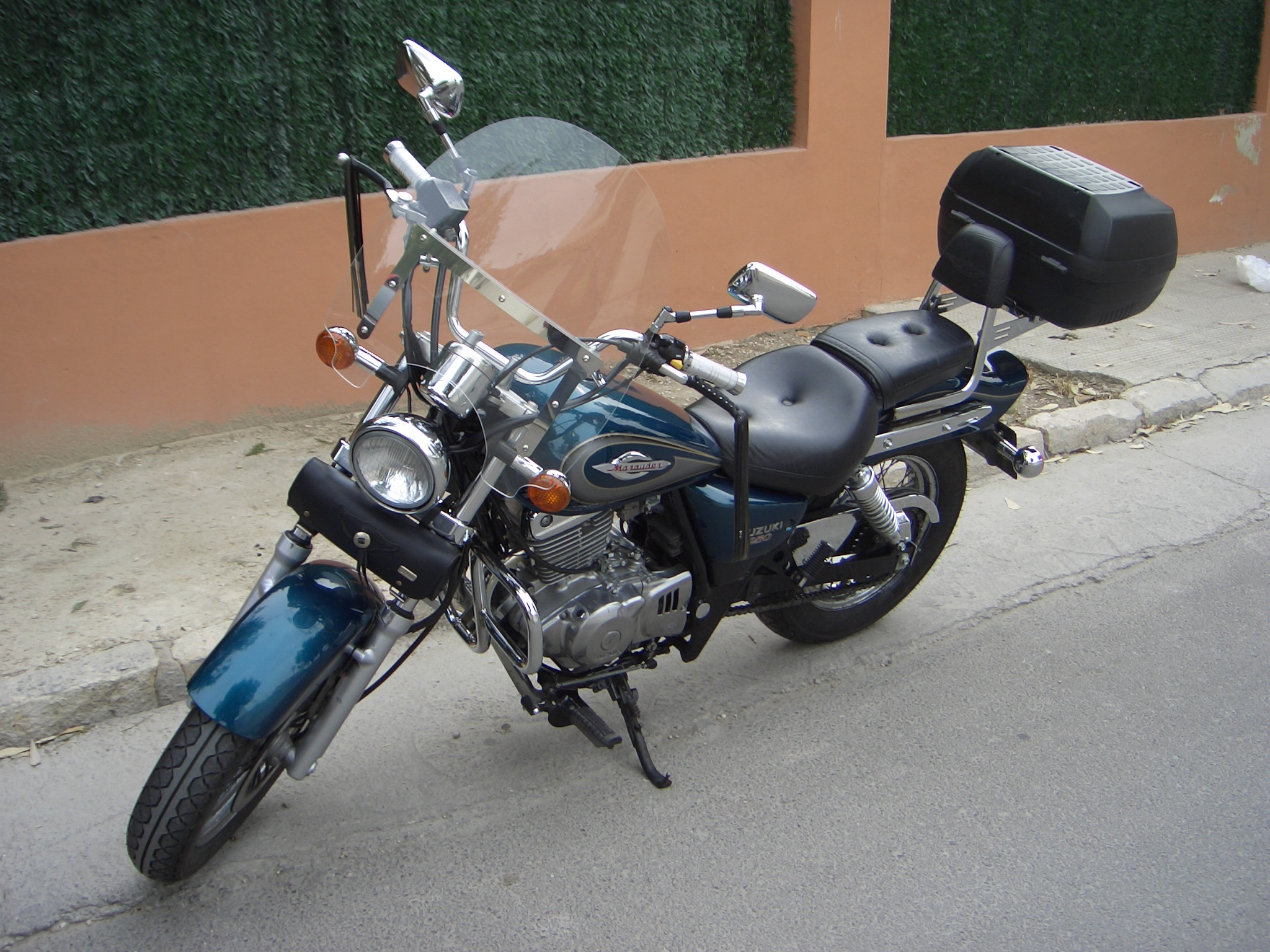 Suzuki GZ250 Marauder del año 2000. Color verde metalizado. Incorpora varios extras como el parabrisas, defensas anti-caídas, puños cromados, flecos, rulo porta-herramientas, respaldo para el pasajero y maleta porta-equipajes.